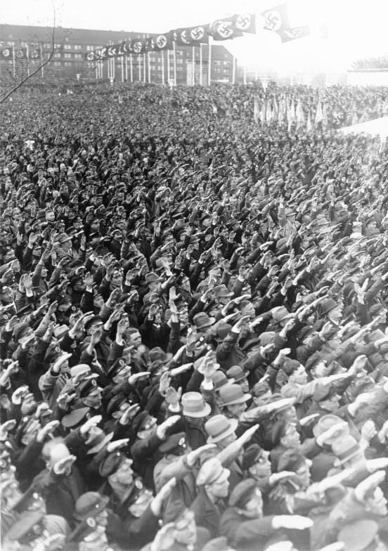 Der 1. Mai 1935 auf dem Tempelhofer Feld mit über 1 Million Teilnehmern